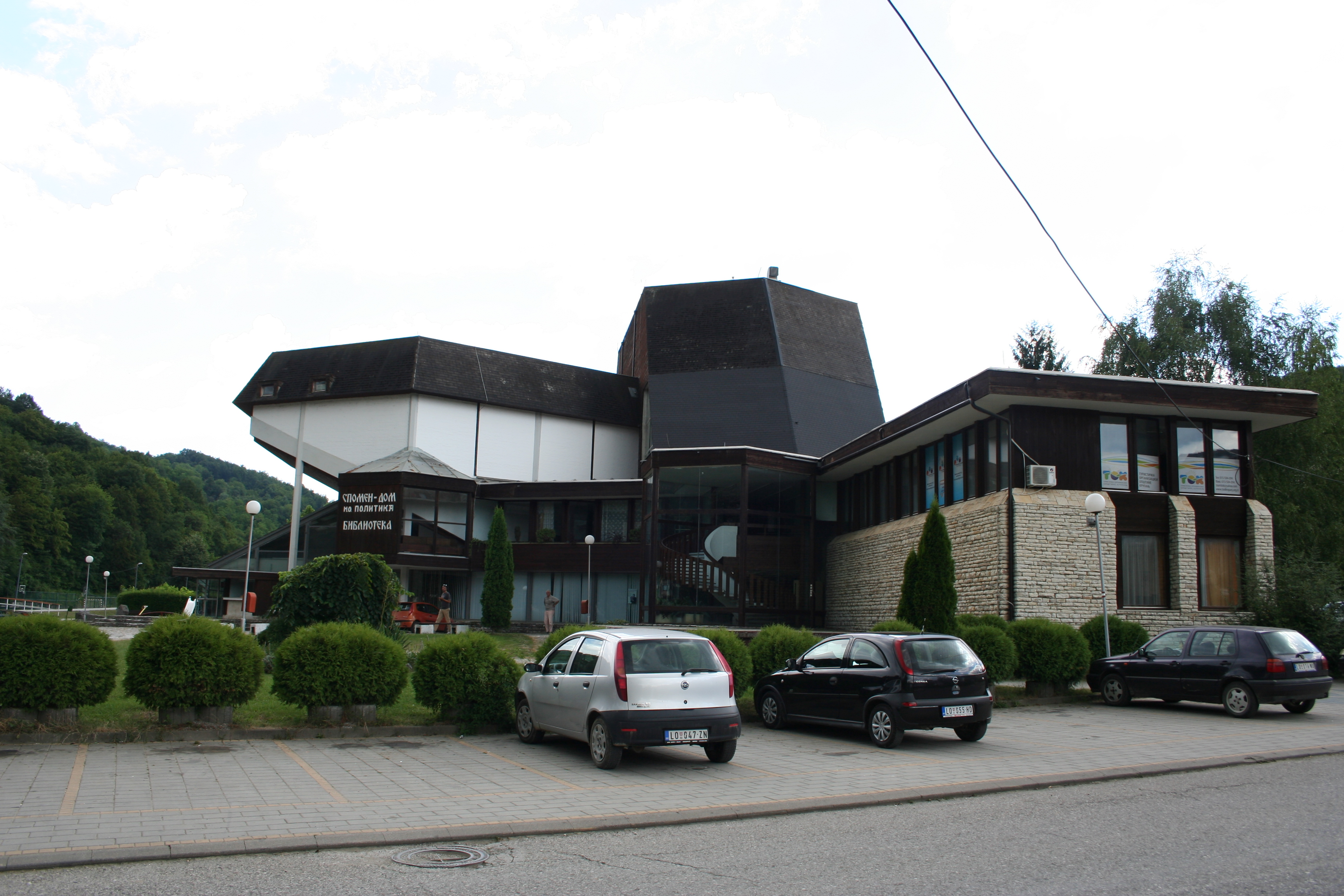 Spomen dom "Politika" Krupanj